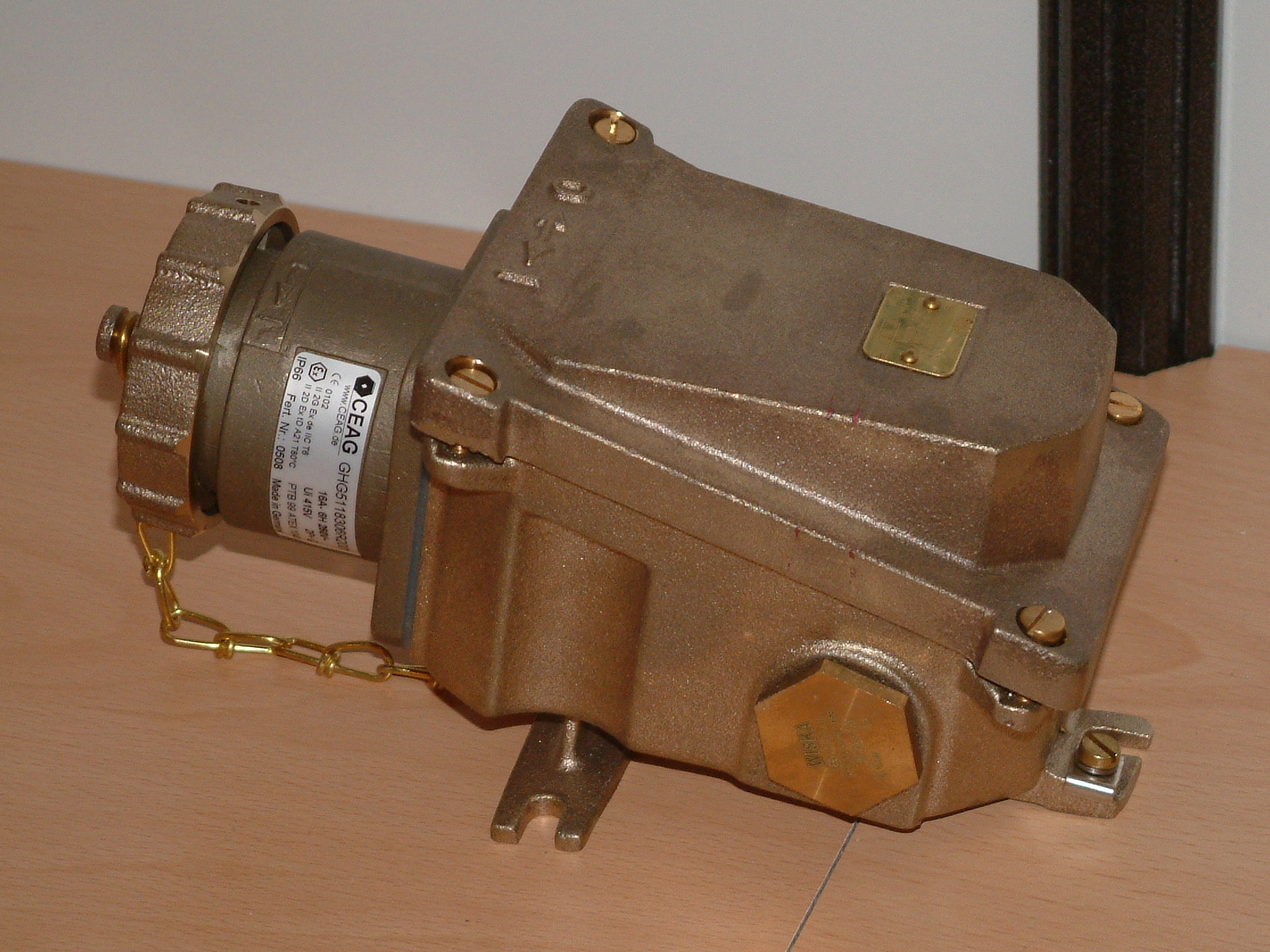 Europort 2009